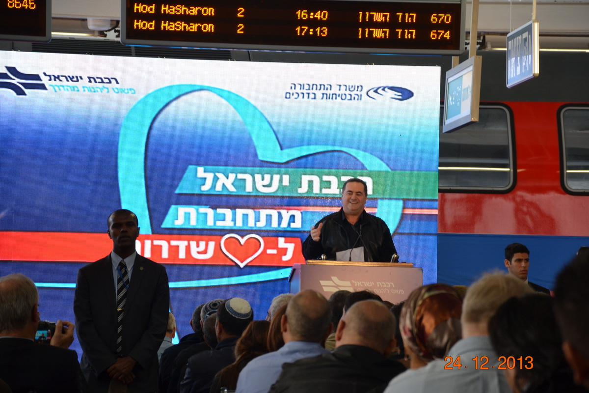 השר ישראל כץ בפתיחת תחנת שדרות